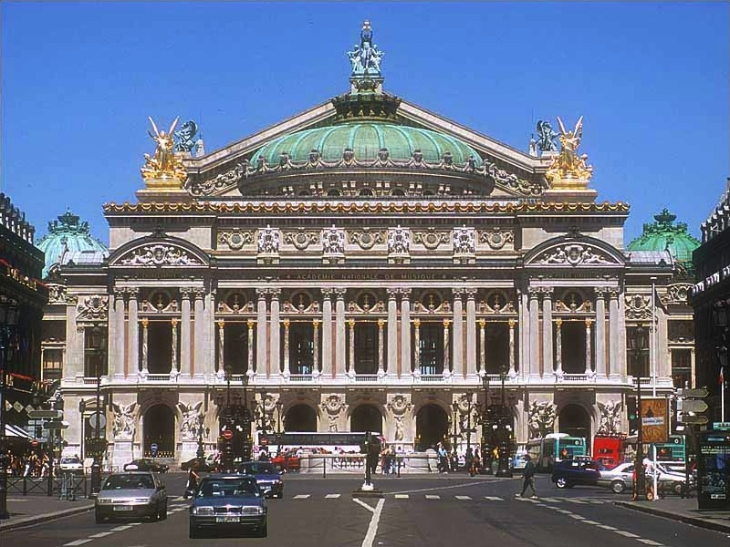 חזית האופרה גרנייה